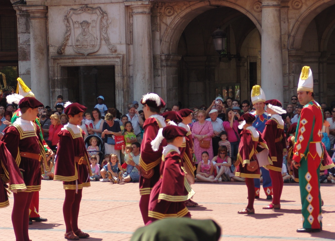 Fiestas de Burgos, los «Danzantes», Plaza Mayor.